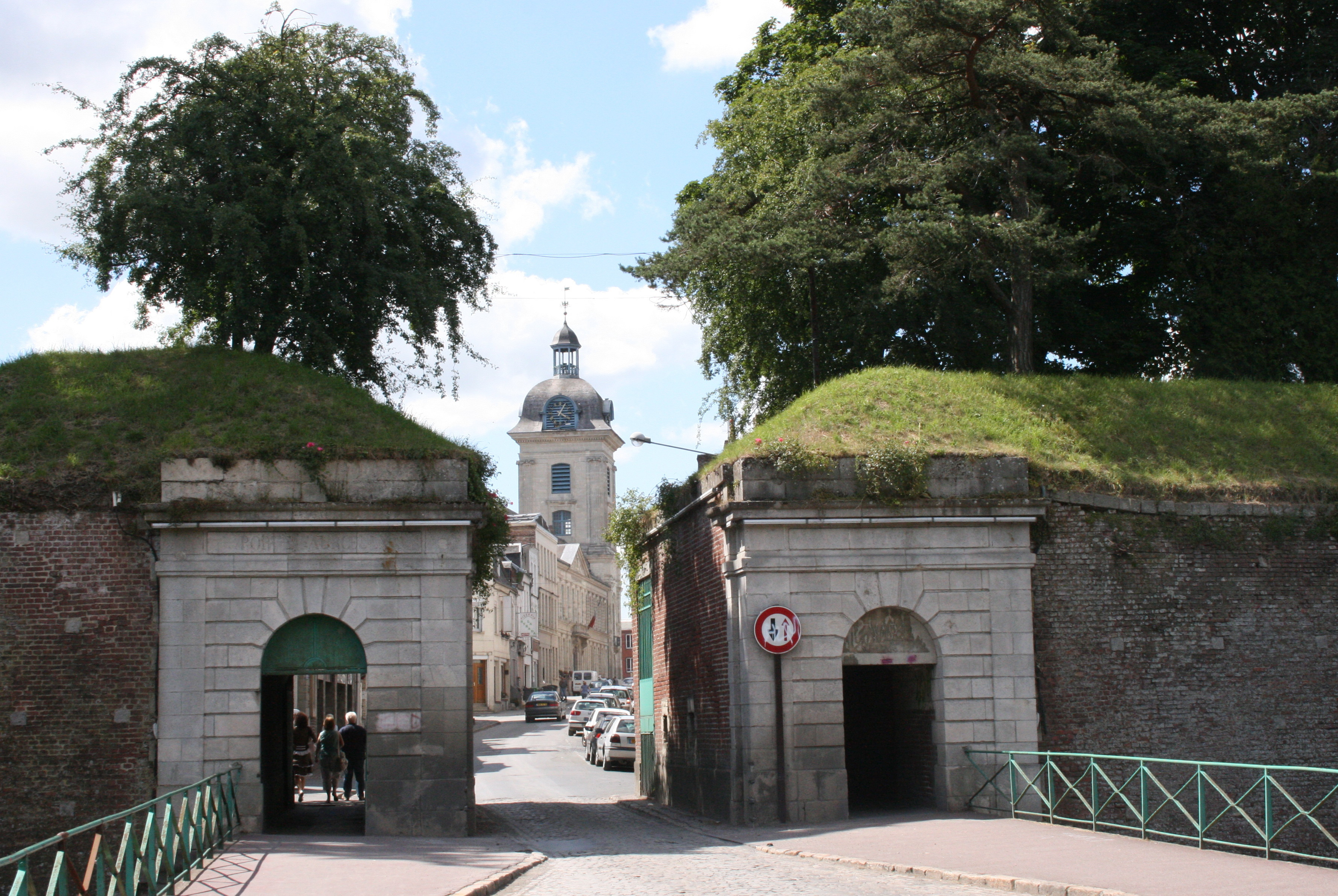 Gemeinde Le Quesnoy unweit der belgischen Grenze im Département Nord. Porte Fauroeulx - Fauroeulxer (Ort in Belgien) Tor.